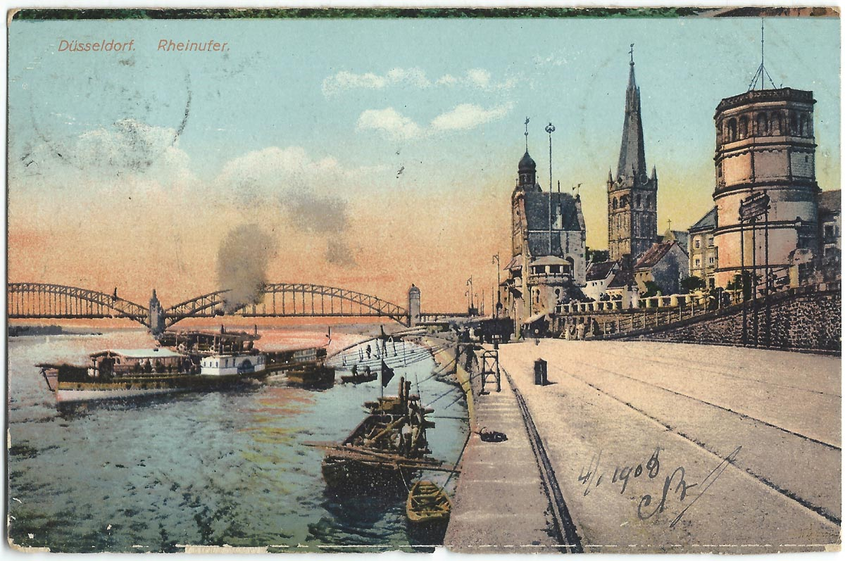 Vue des quais de Düsseldorf au début du XXe siècle (carte postale).